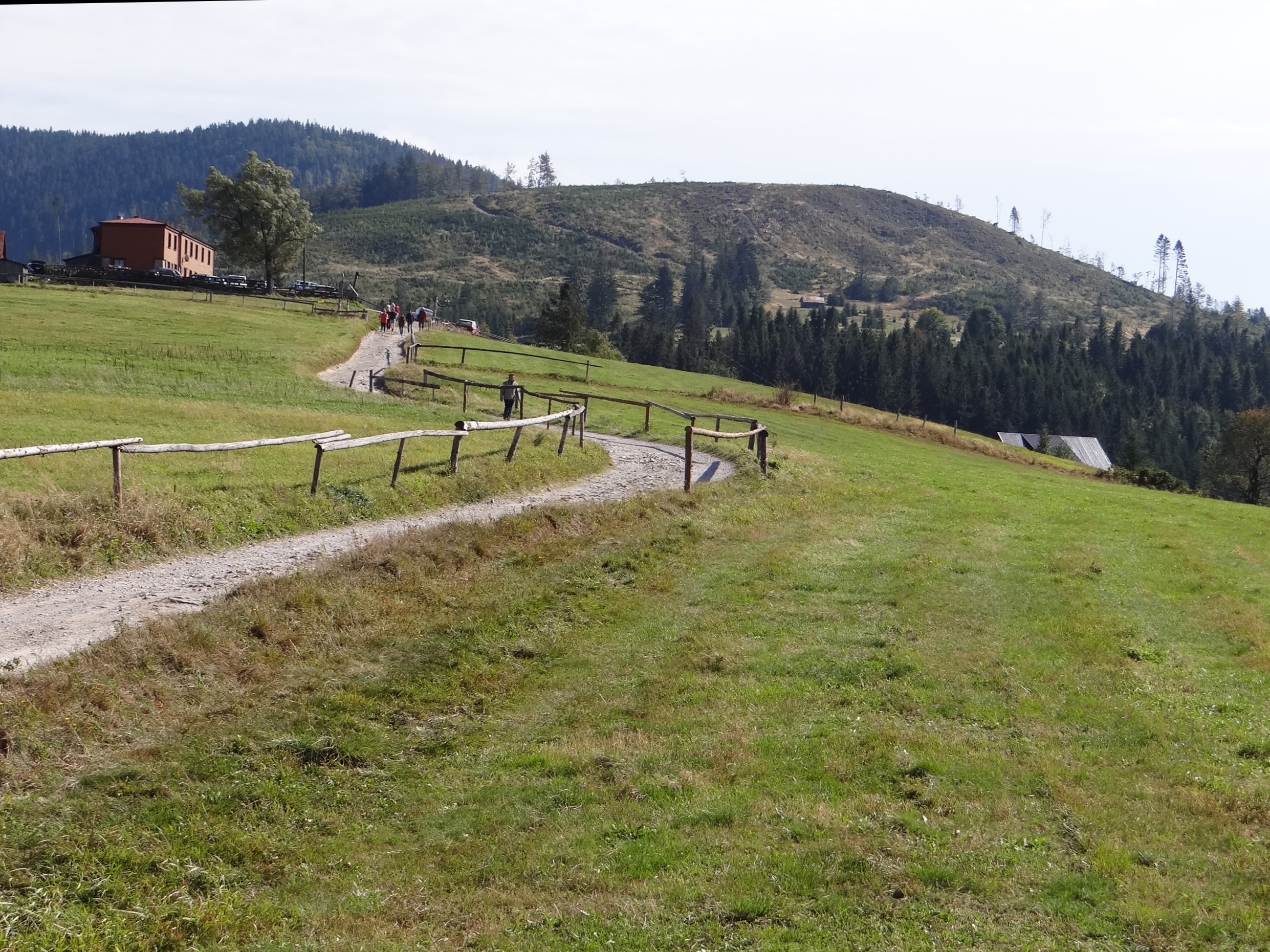 Hala Boracza